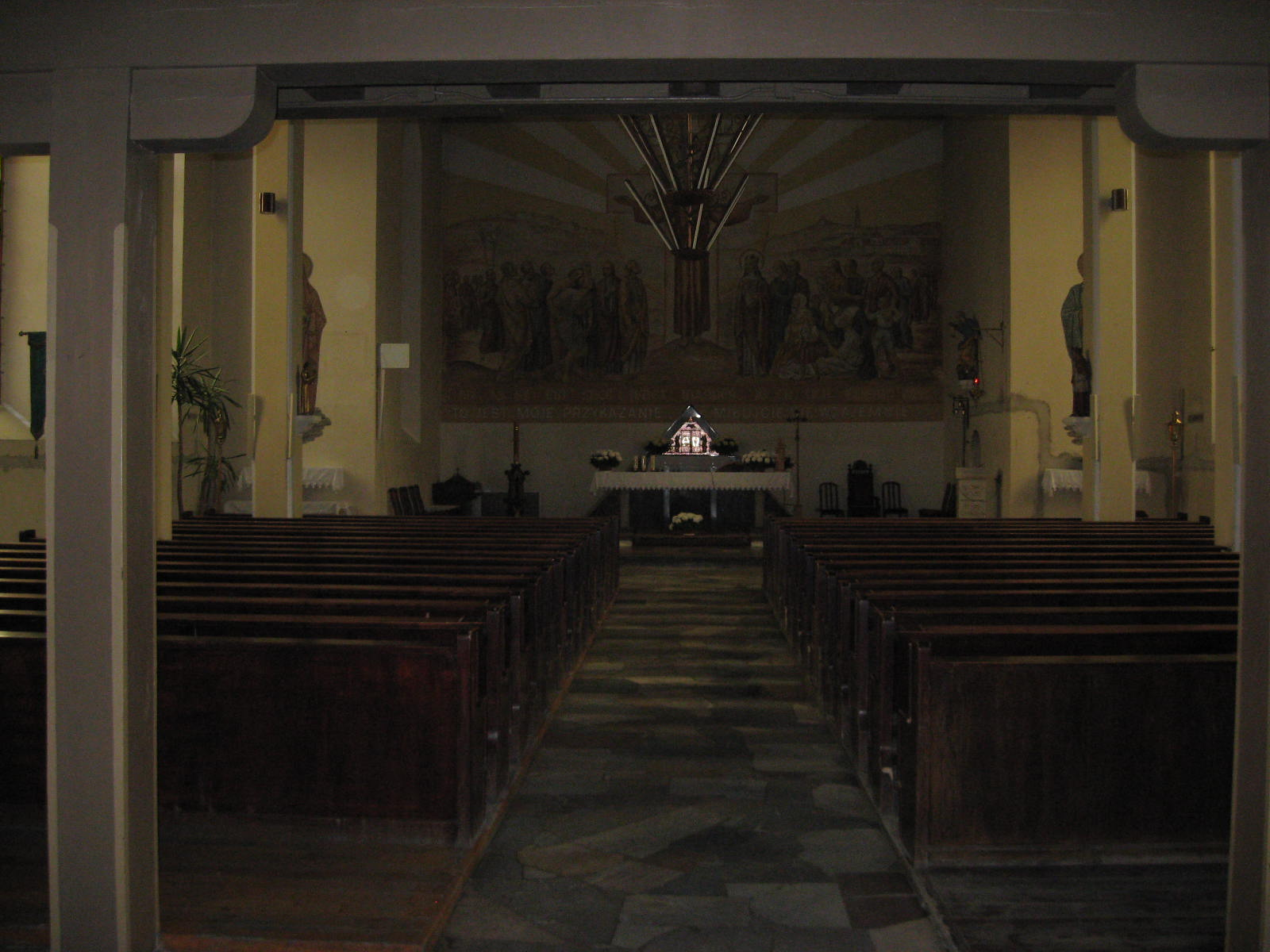 Nawa główna...w głębi prezbiterium